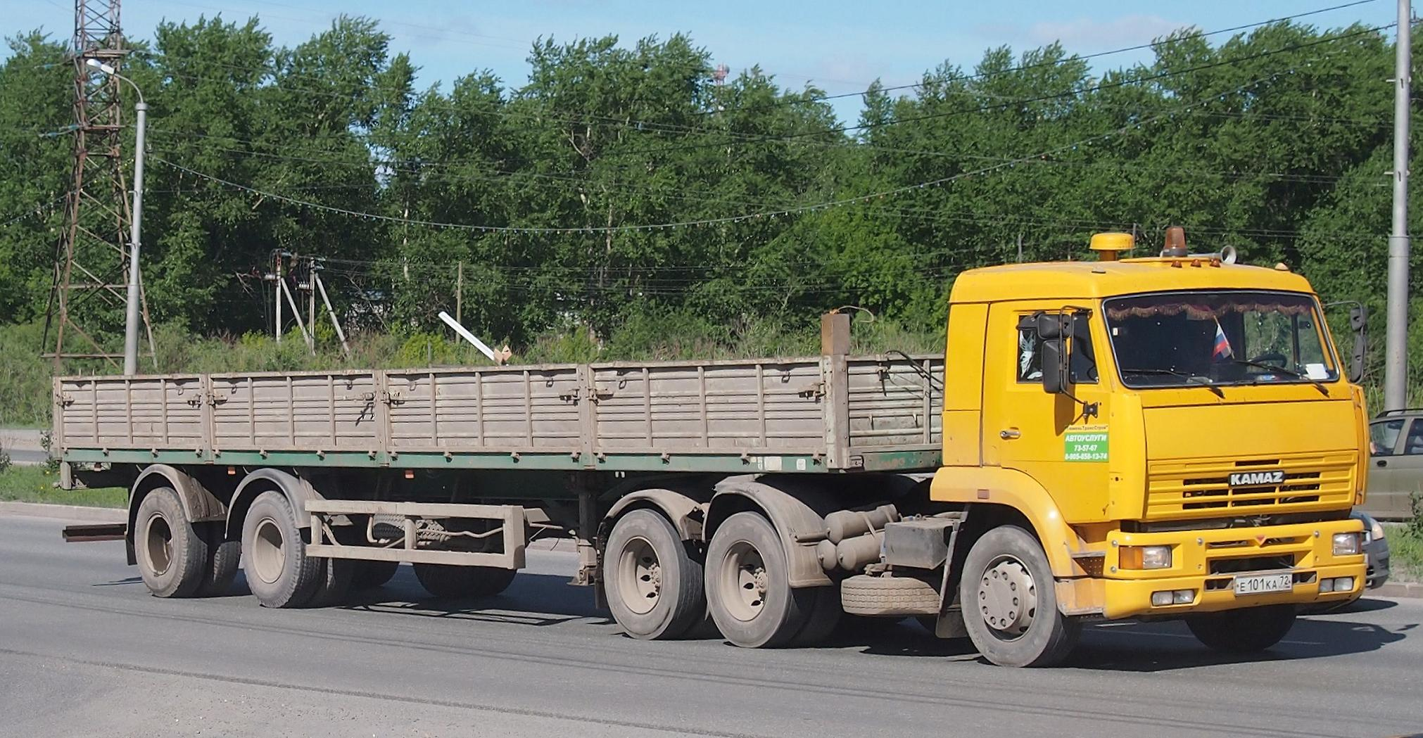 КАМАЗ-65116, Тюмень